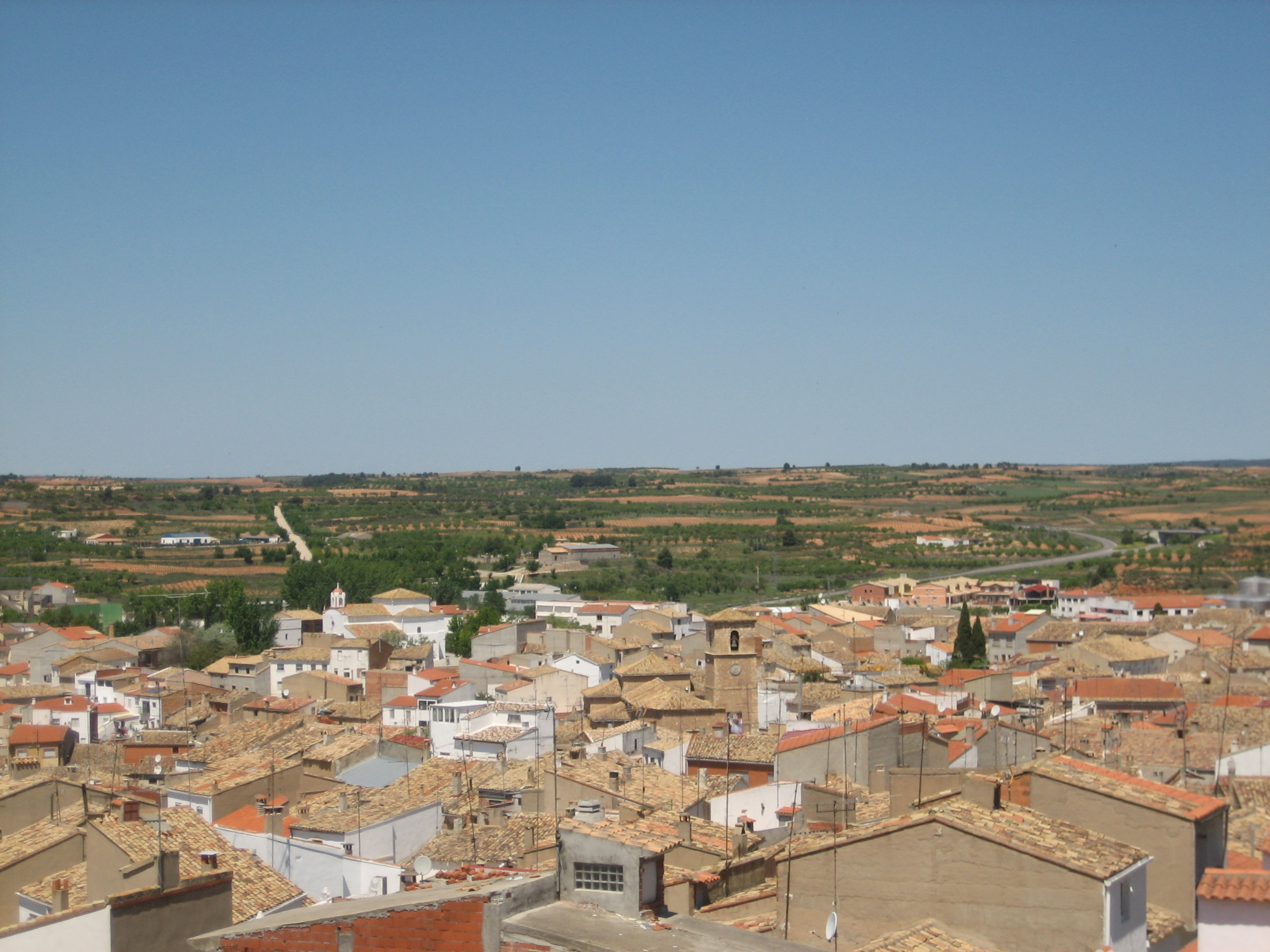 Vista de Minglanilla desde el castillo, con iglesia de Nuestra Señora de la Asunción en el centro de la imagen.